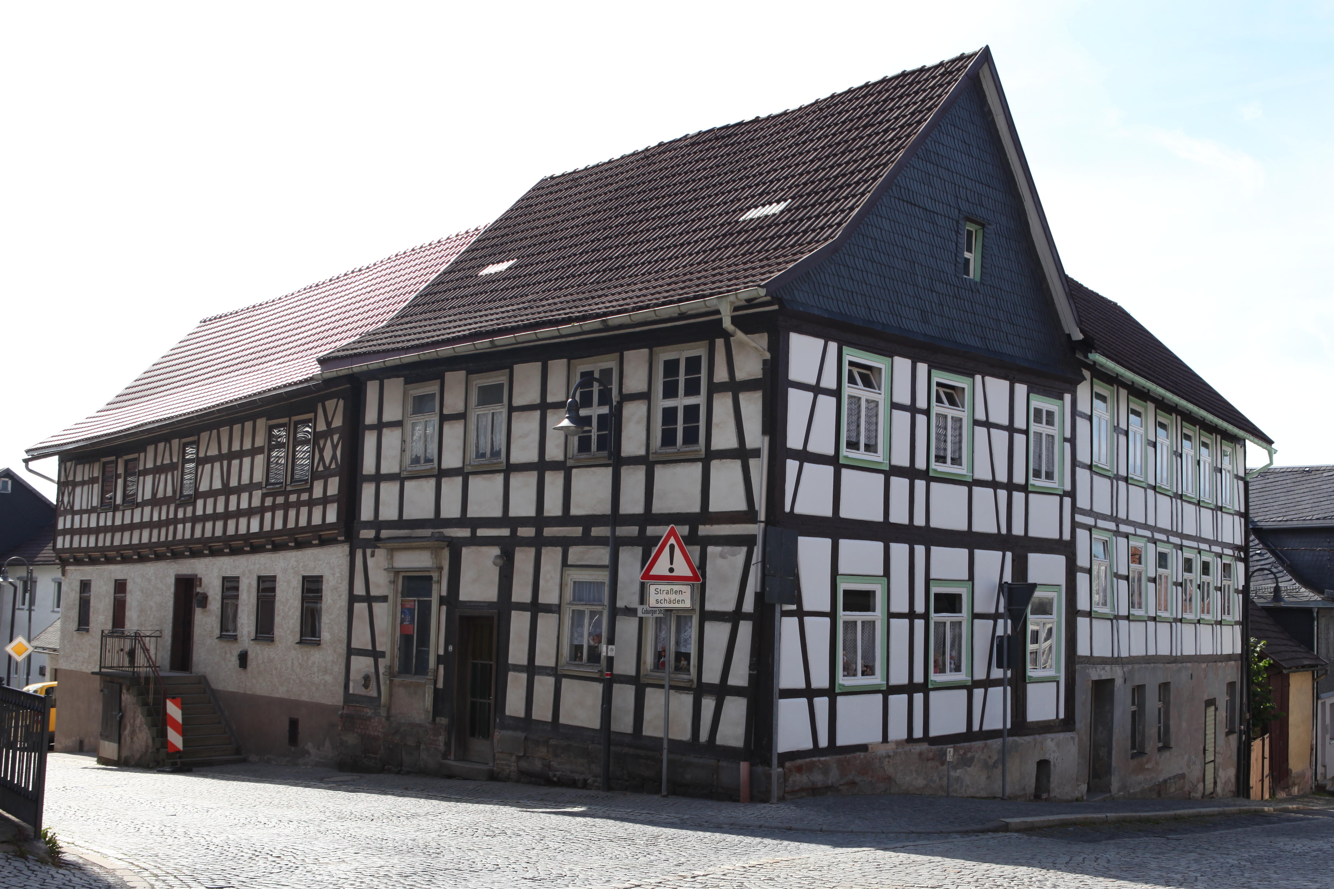 Ehemalige Gaststätte in Schalkau, Coburger Str. 2